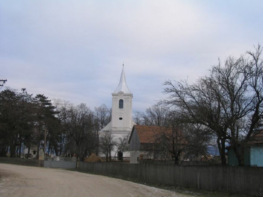 Szörcsei református templom, 2006